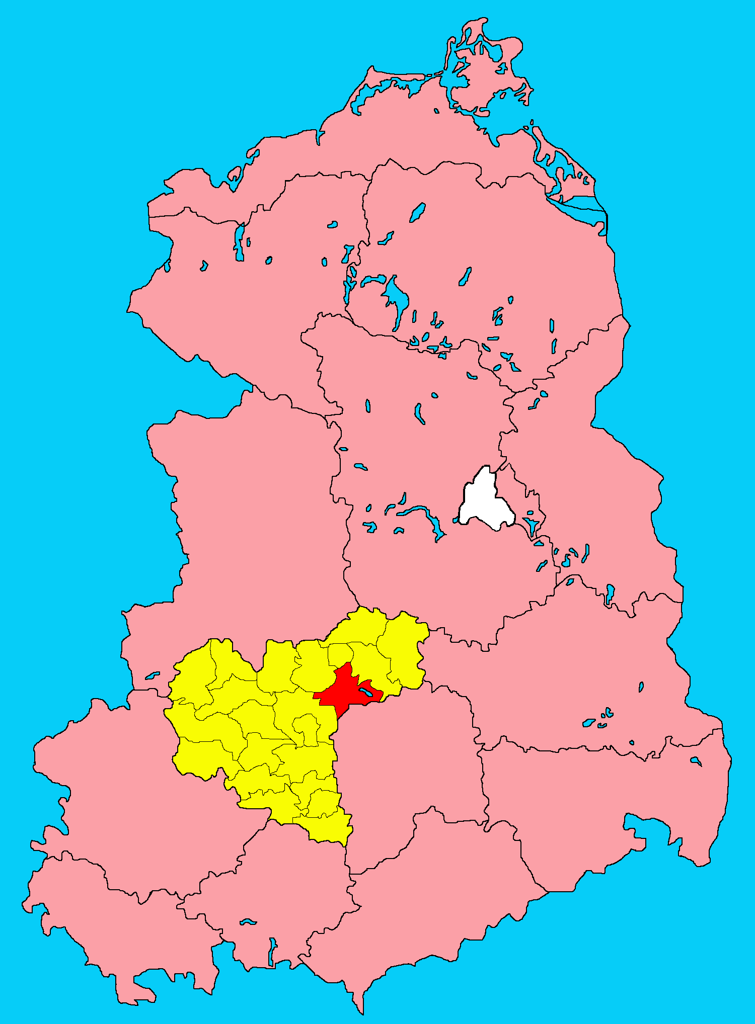 Lage Kreis Bitterfeld